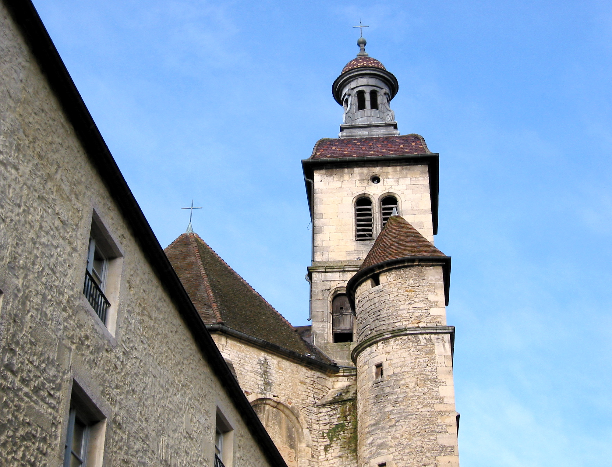 Monument de Dole: Chapelle du collège de l'Arc